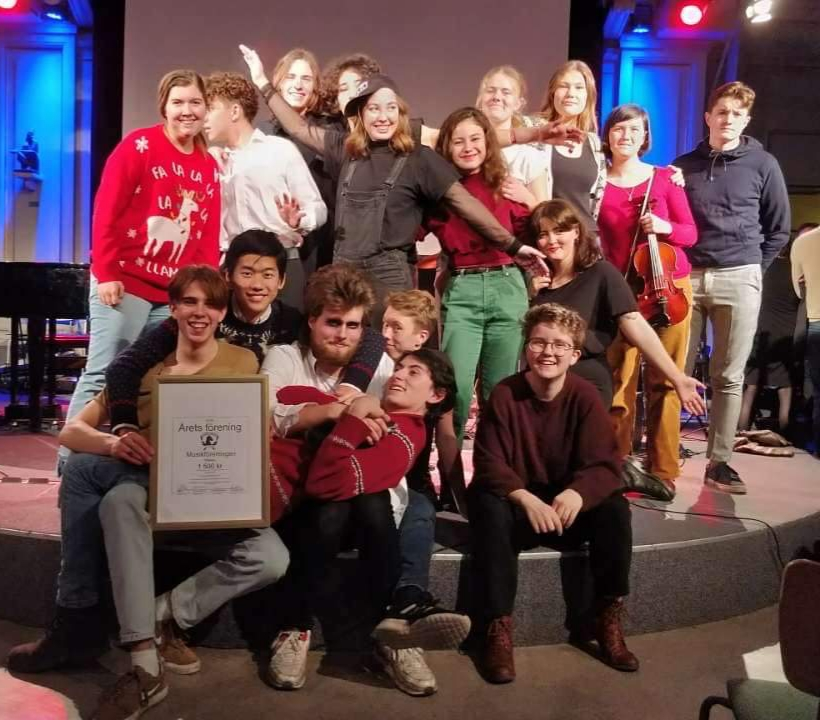 Musikföreningen 2019/2020, efter att ha tilldelats Årets Förening 2019